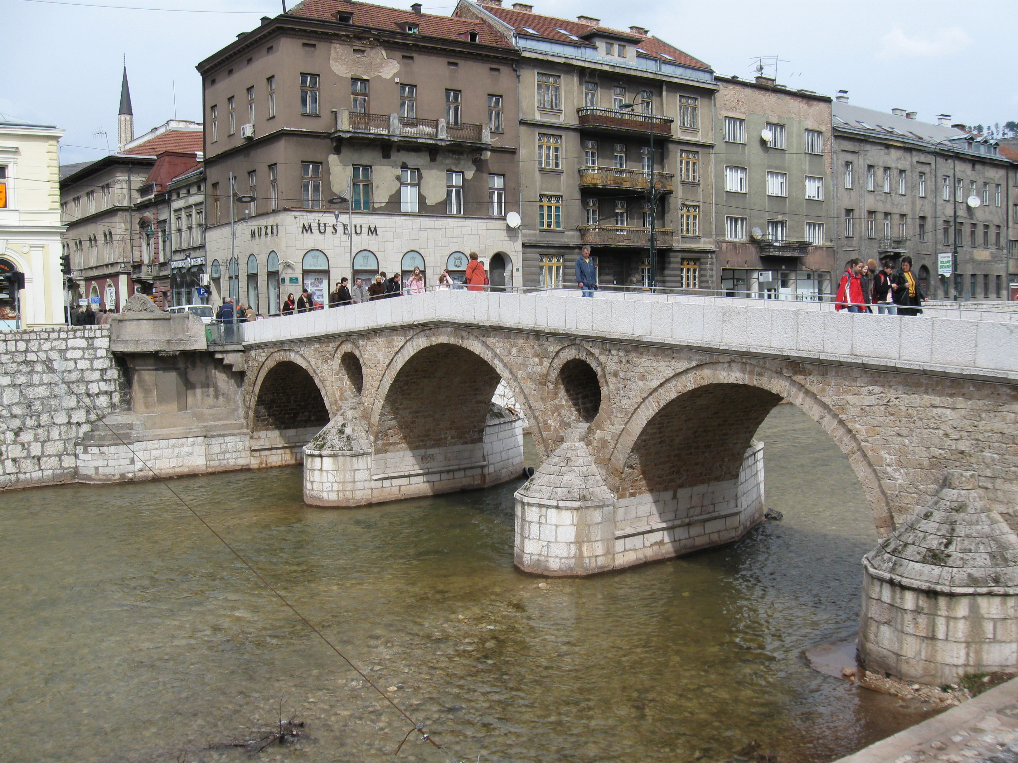 Sarajevo: Miljacka i most